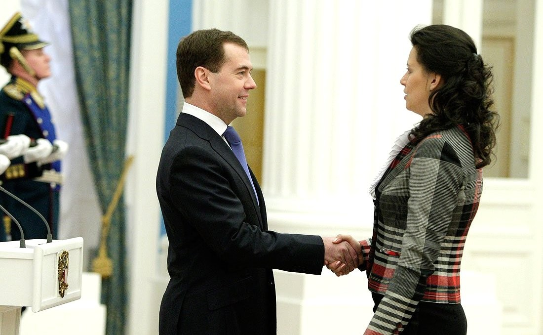 Президент России Дмитрий Медведев поздравляет Екатерину Шишацкую на церемонии вручения премий Президента Российской Федерации в области науки и инноваций для молодых учёных за 2009 год.